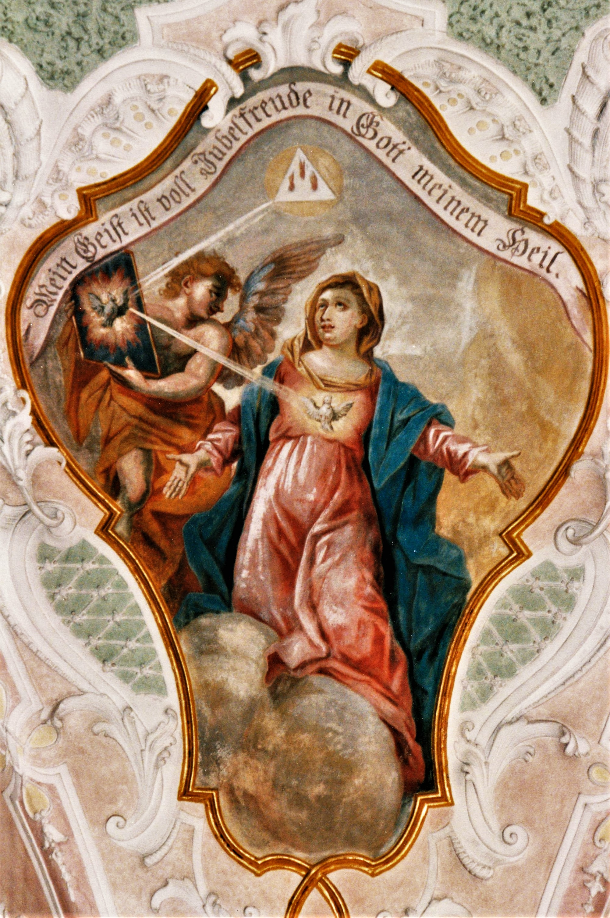 Pfarrkirche Mariä Verkündigung (Leeder), Fresko: Illustration des Magnificat